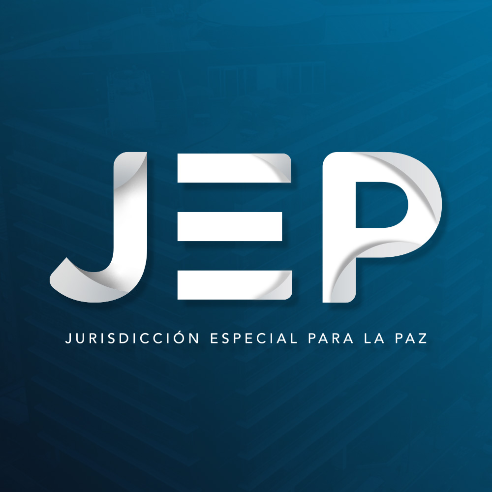 Jurisdicción Especial para la Paz